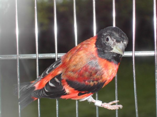 Spinus cucullata maschio